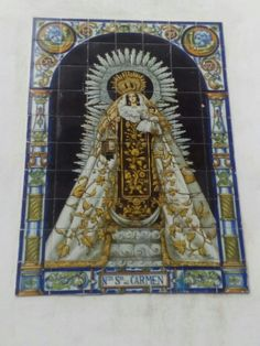 Azulejo de la Virgen del Carmen de la iglesia de Santa Catalina. Sevilla, Andalucía, España.